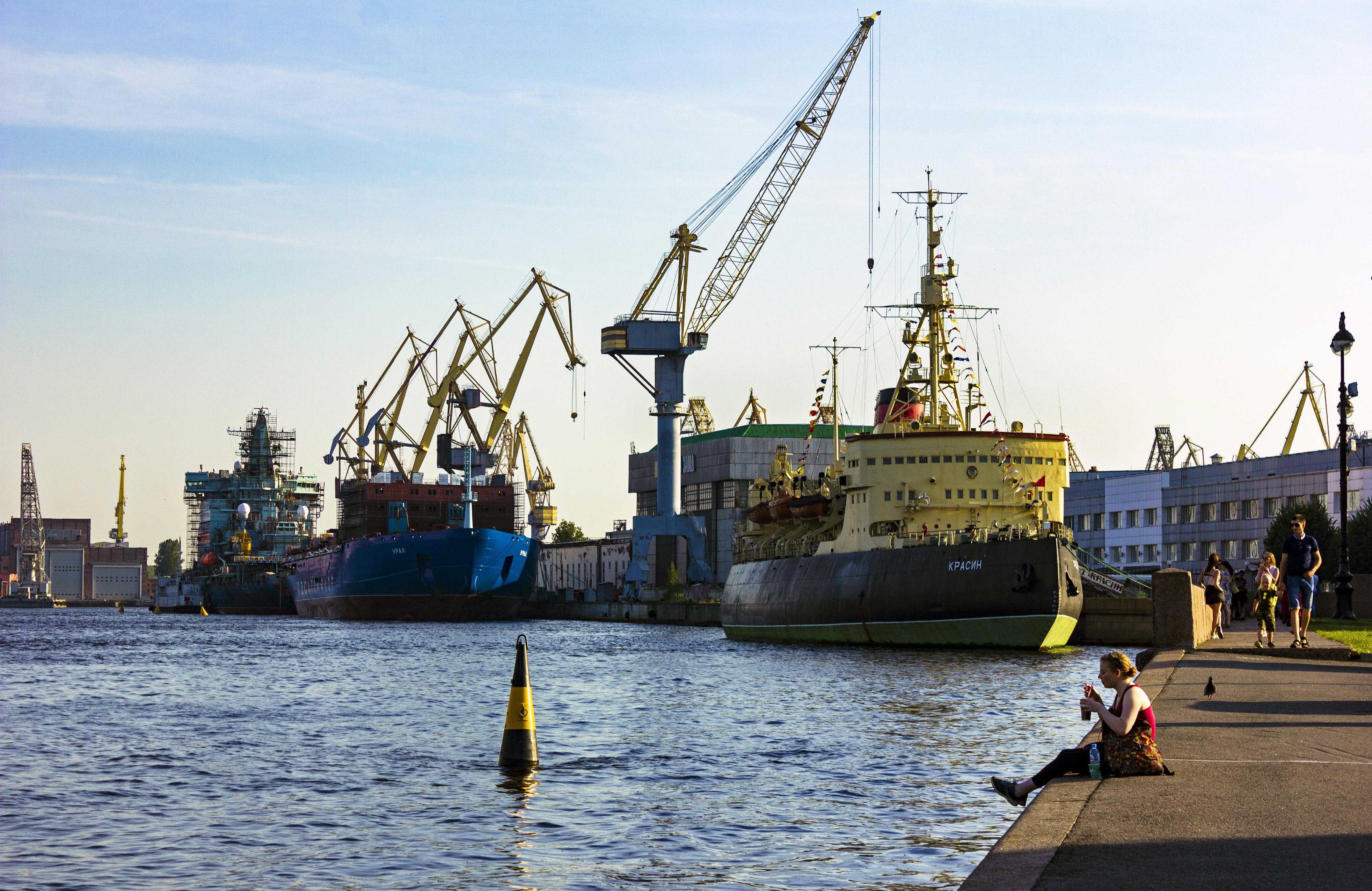 Ледокол «Красин» («Святогор»): набережная Лейтенанта Шмидта, в створе 22-й линии Васильевского острова, Василеостровский район, Санкт-Петербург